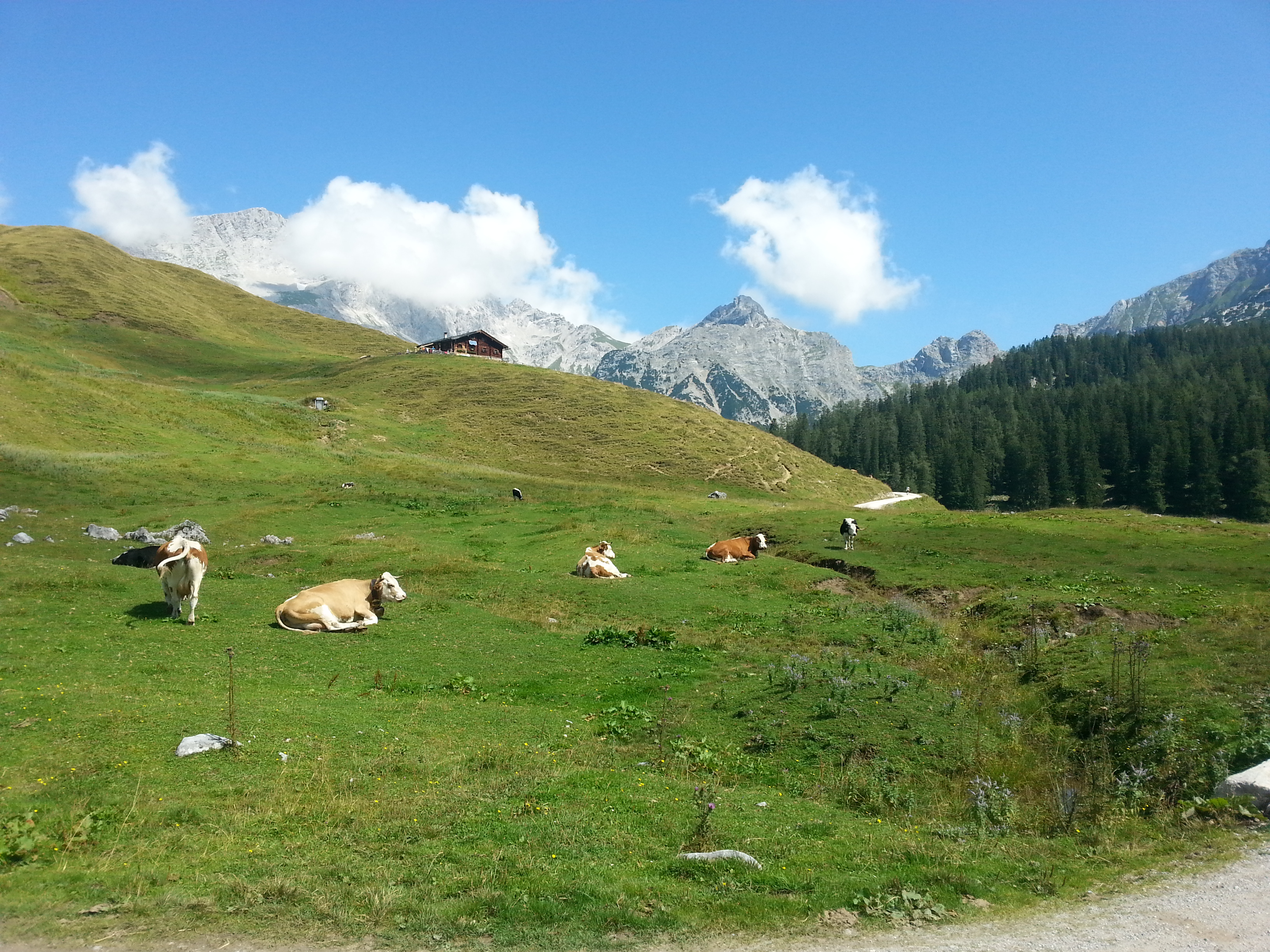 Foto von der Kallbrunnalm. Im Hintergrund ist eine Almhütte zu sehen.